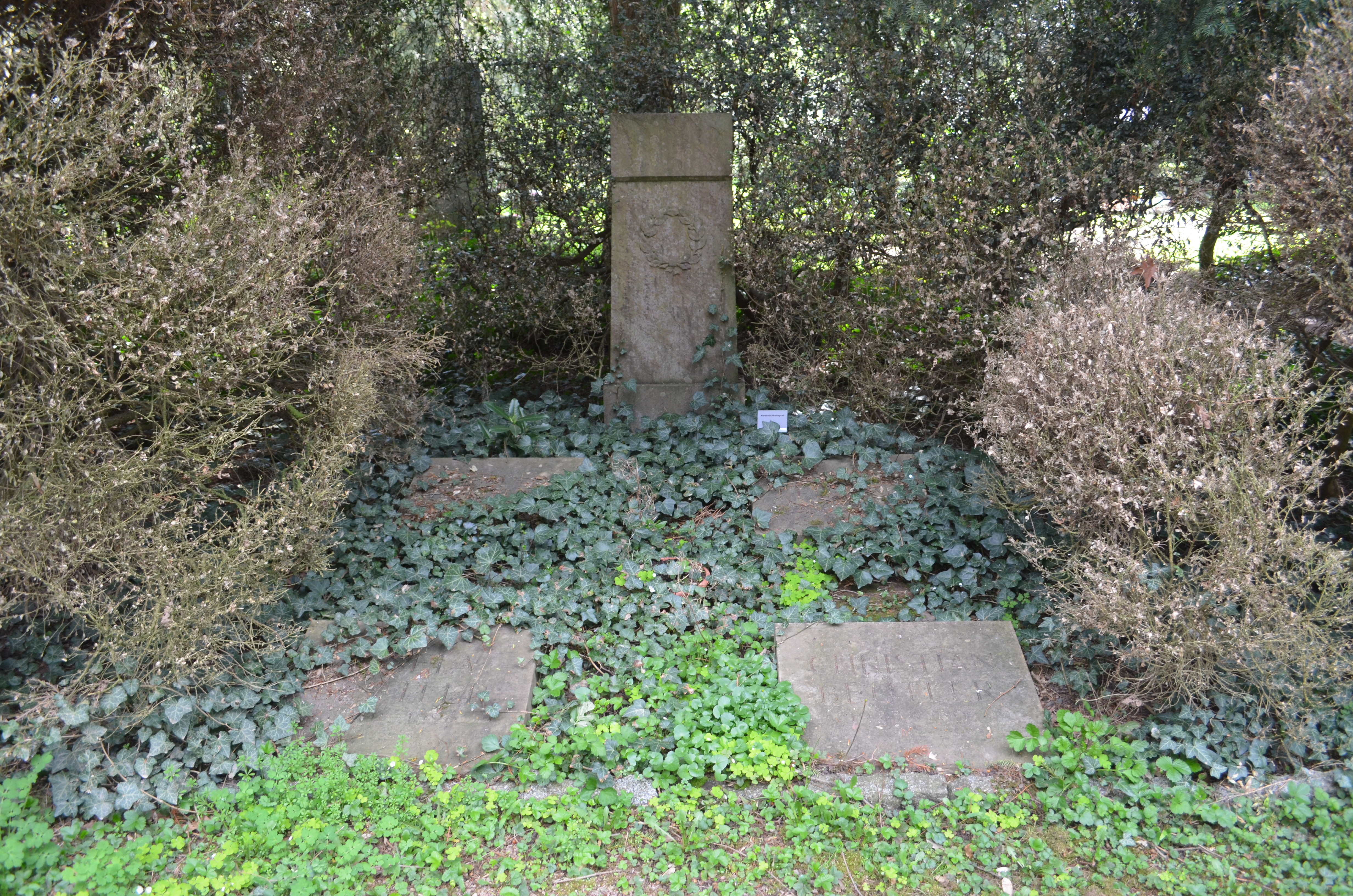 Frankfurt, Hauptfriedhof, Grab C 214a Beutler